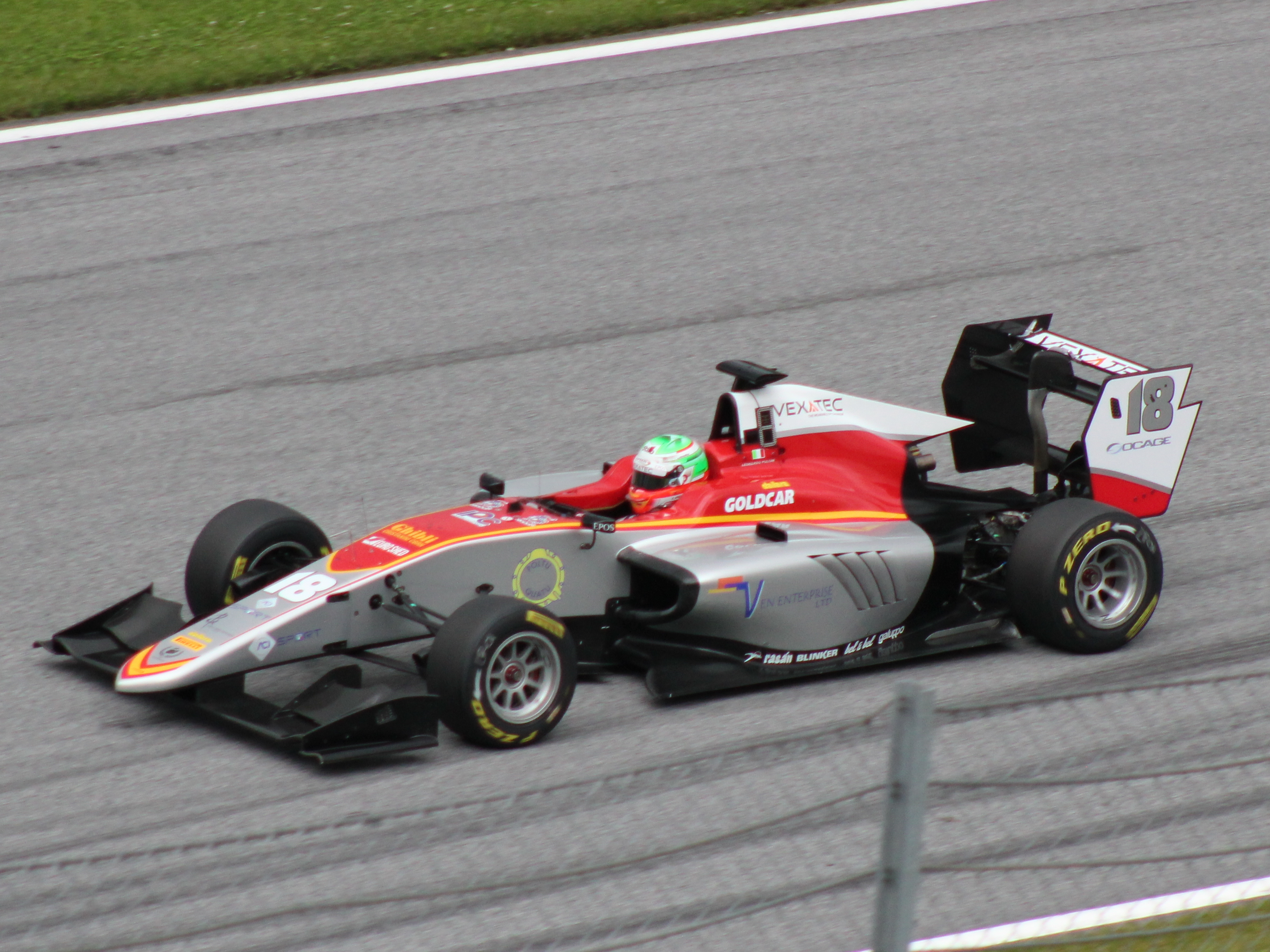 18 Leonardo Pulcini beim Rennwochenende in Österreich 2018